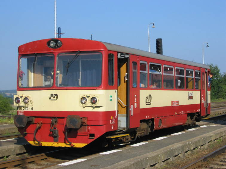 Motorový vůz 810, oblast stanice Libuň